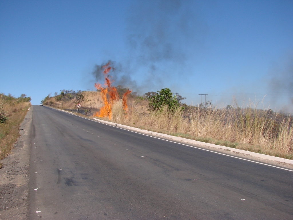 BR 080 - Padre Bernardo - Goiás - Brasil.